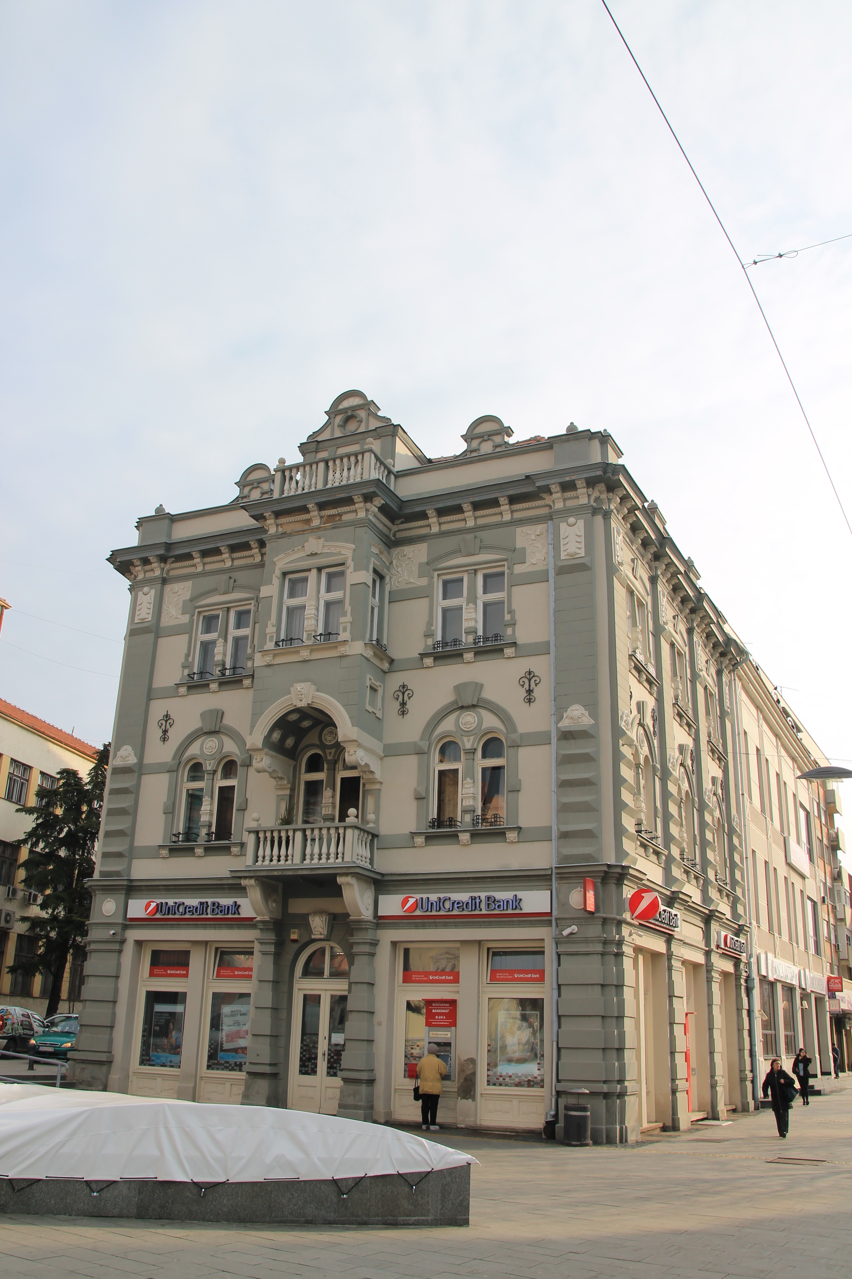 Staro jezgro Zrenjanina